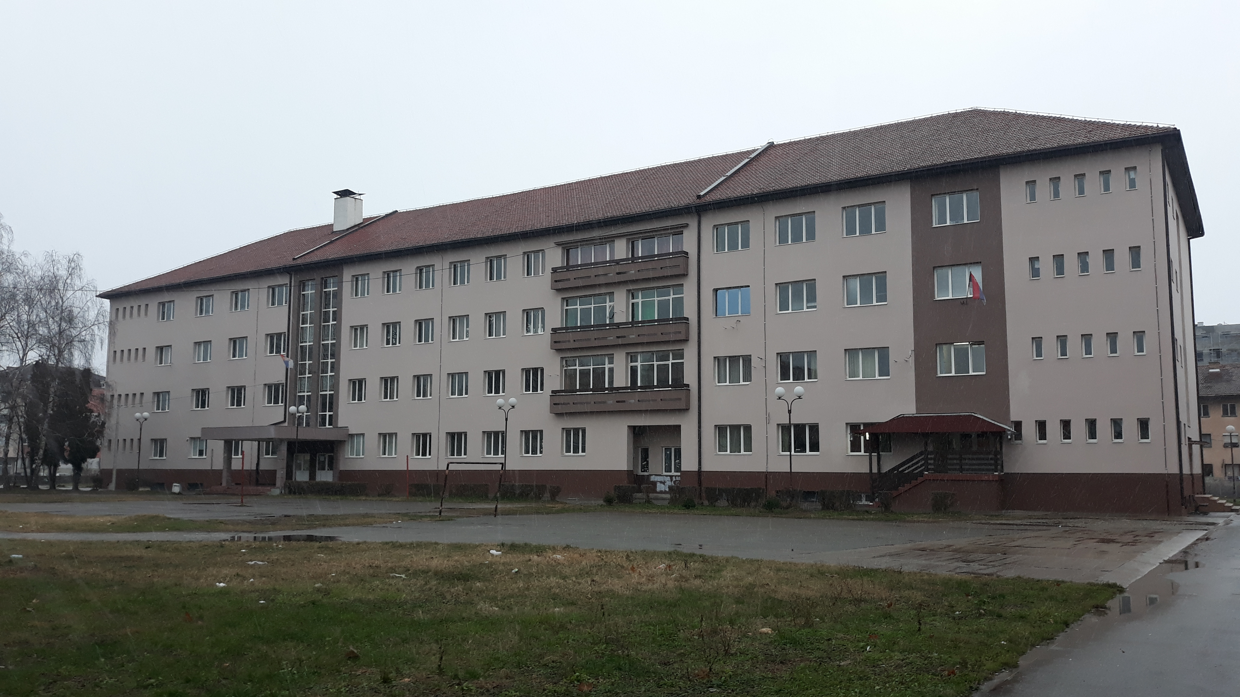 Зграда краљевачке Гимназије, након завршетка радова на фасади.